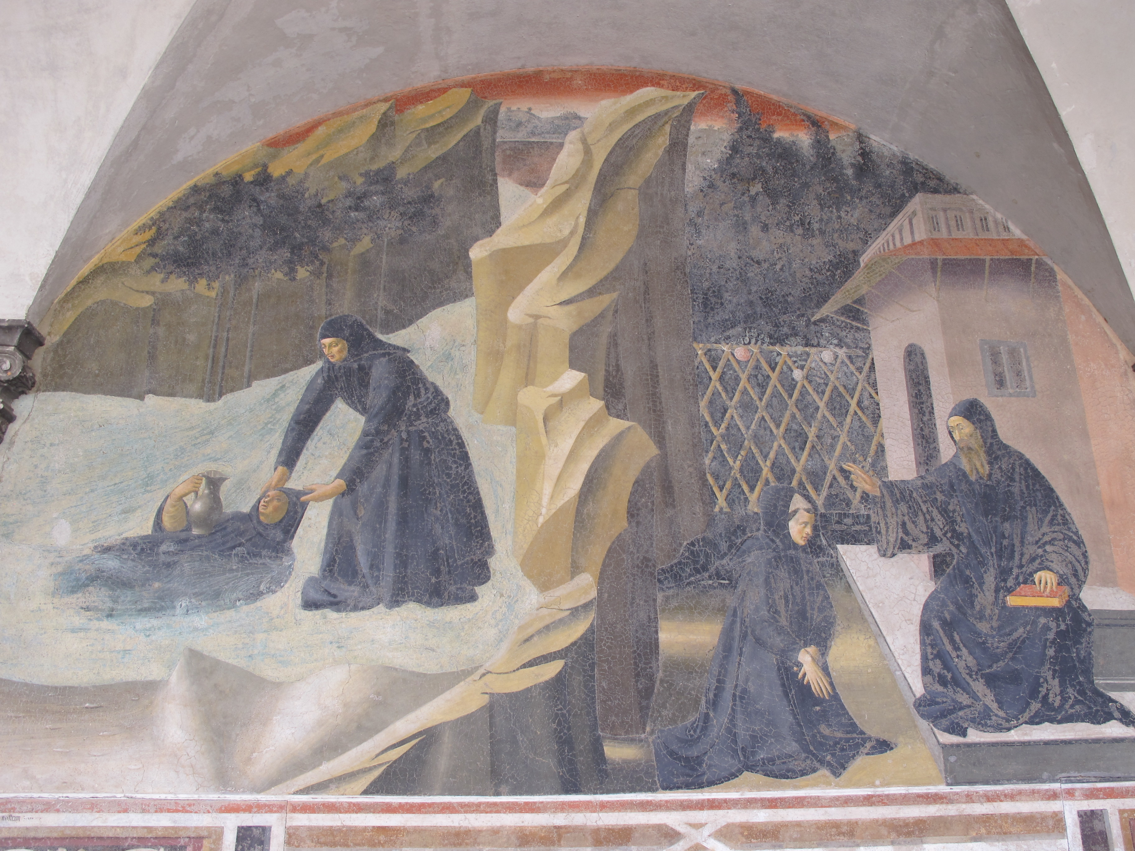 firenze 2011